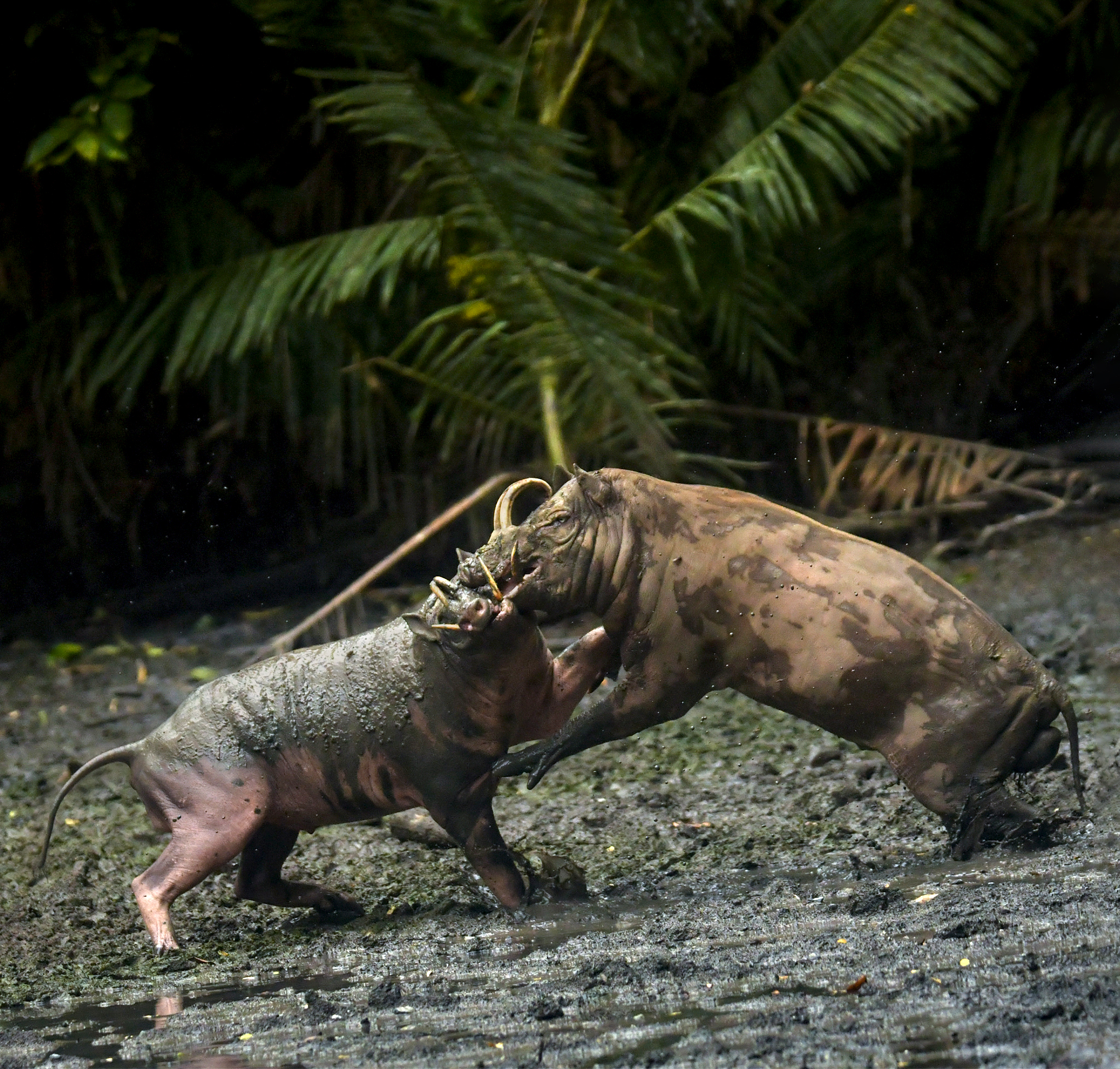 Babirusa adalah salah satu jenis babi liar yang hidup di hutan hujan tropis yang ada di Sulawesi,berkelahi adalah salah satu cara mereka untuk menarik perhatian betina